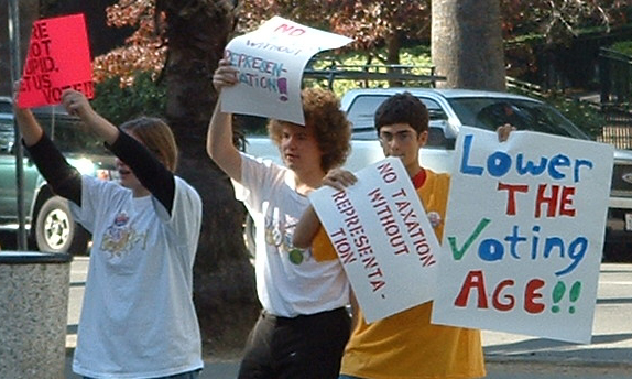 NYRA Berkeley Voting Age Protest